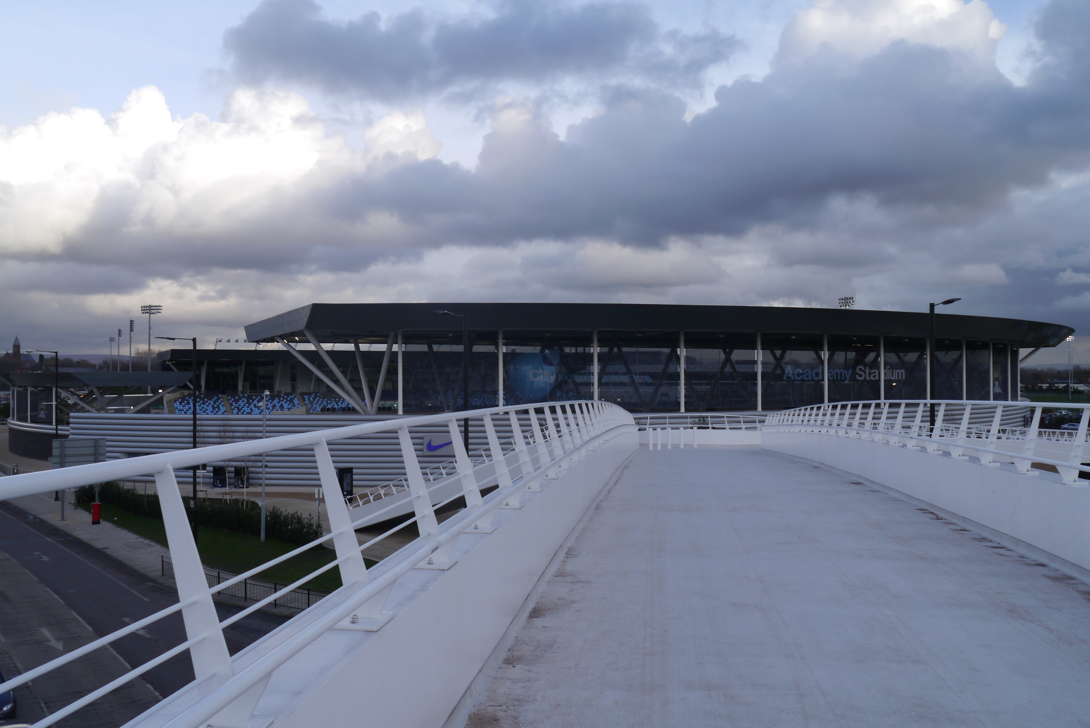 Le stade de l'équipe réserve de Manchester City